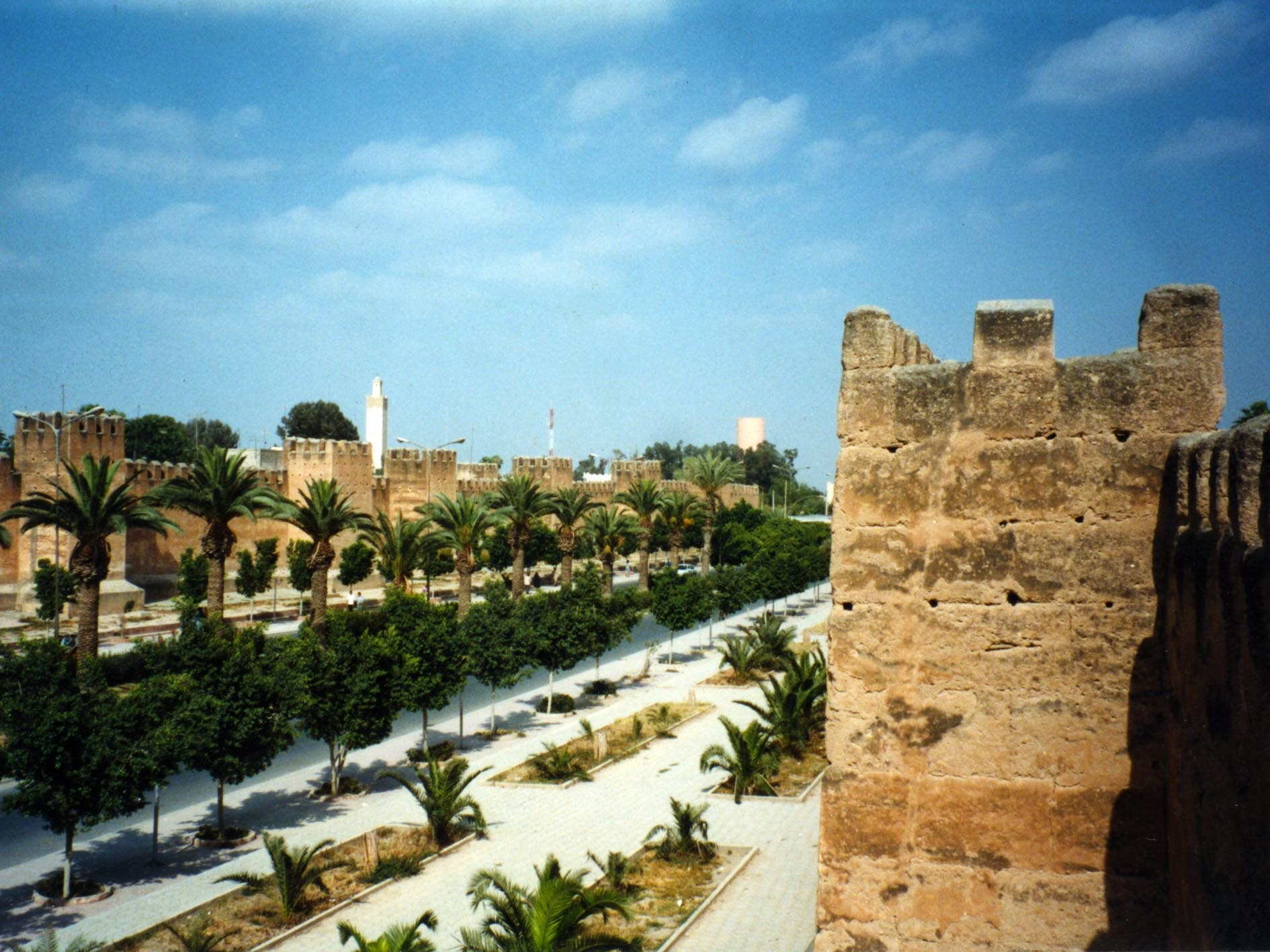 Taroudant Haupttor zur Innenstadt